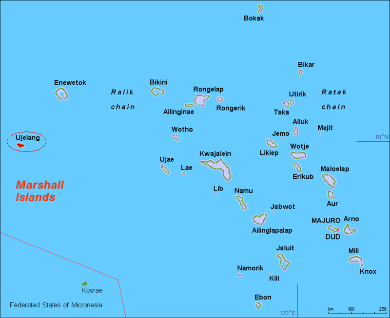 Mappa di Ujelang